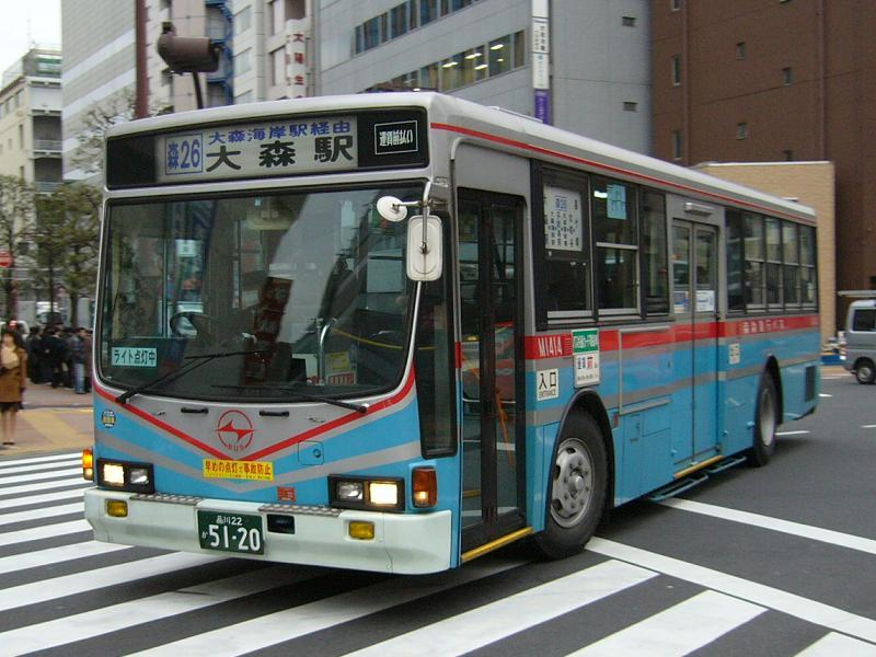 登録番号 品川22か51-20 京浜急行バス大森営業所所属 車番M1414 2006年2月28日 大森駅前にて撮影 現在は廃車